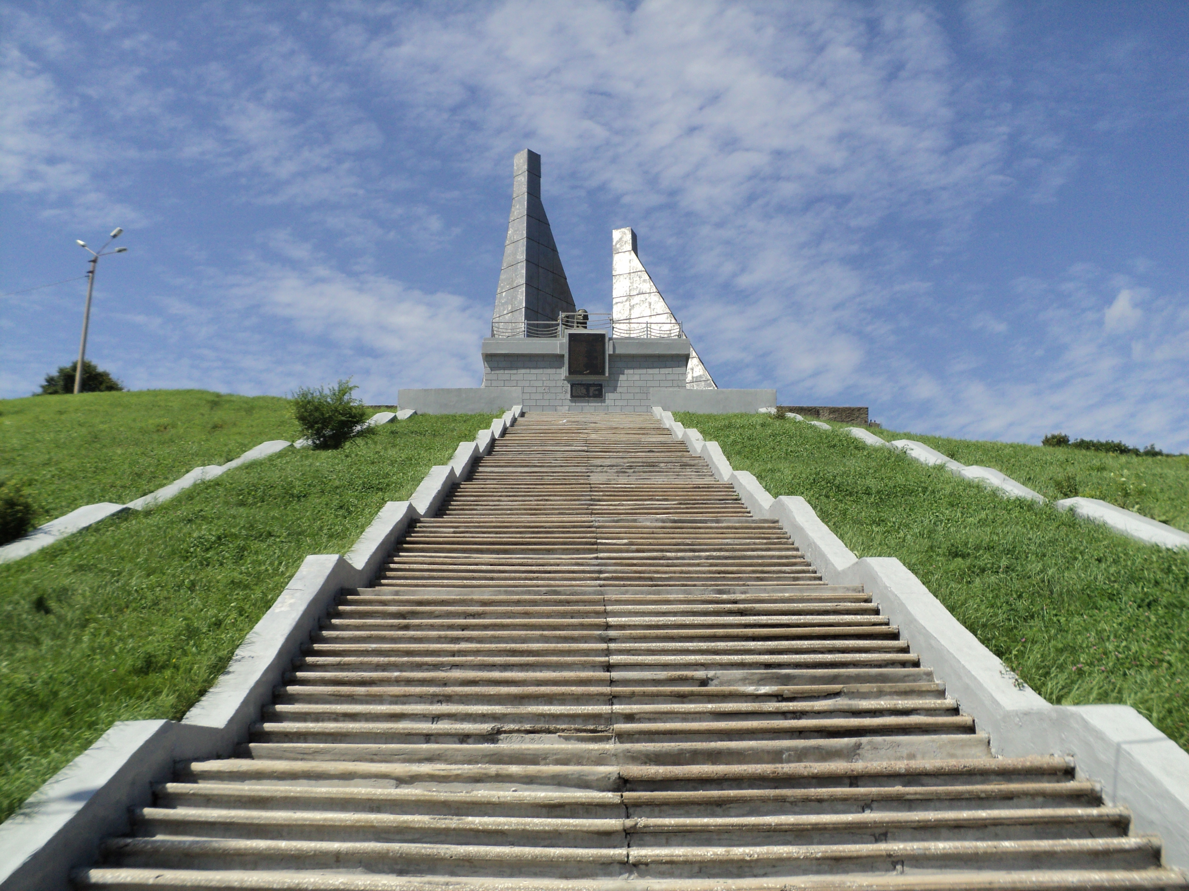 Сопка Лебединая в Находке